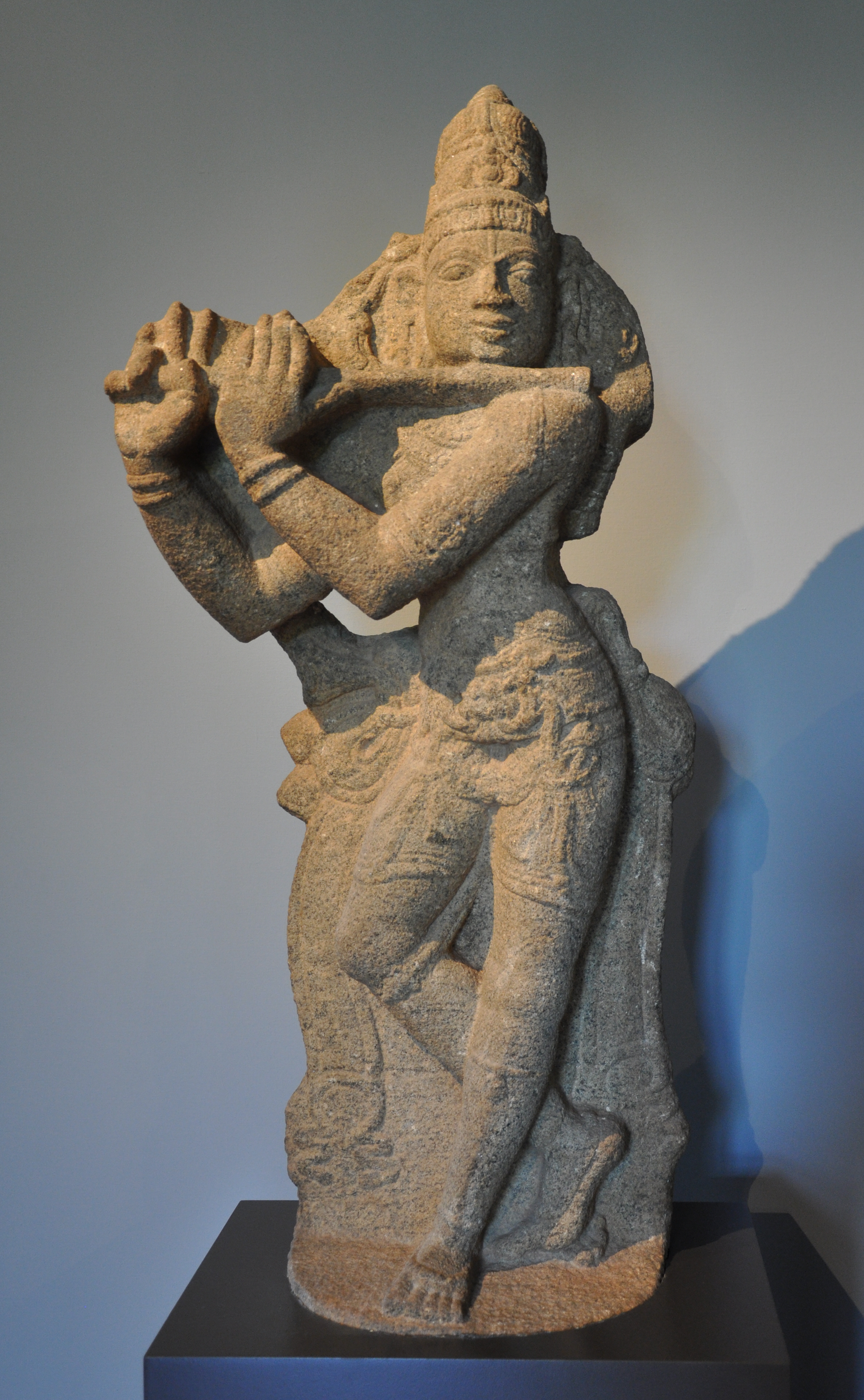 Flöte spielender Gott Krishna (Venugopala); Indien, 15./16. Jahrhundert; Granit Museum Rietberg, Zürich; Inv. Nr. RVI 226